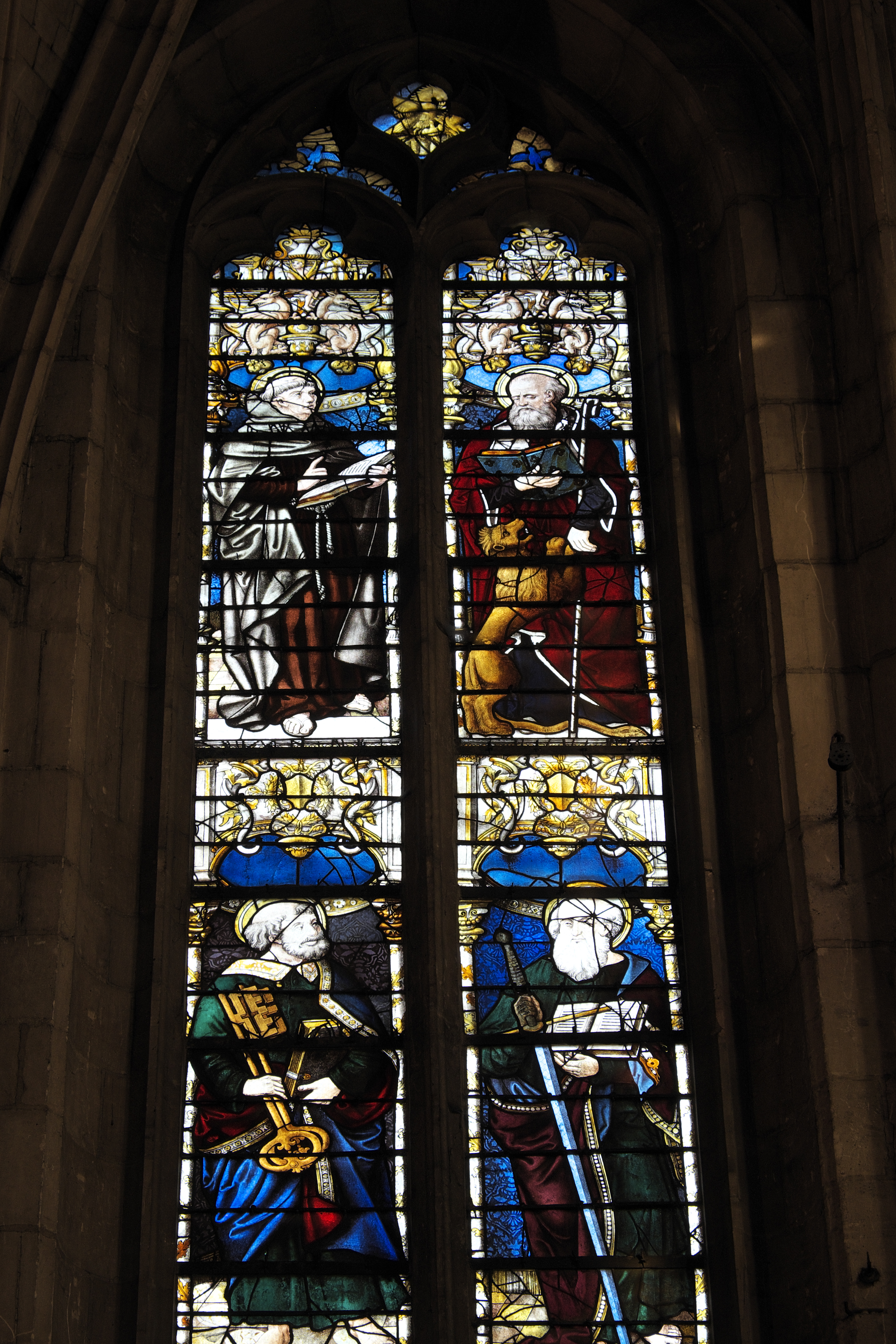 Katholische Pfarrkirche Saint-Martin (Collégiale Saint-Martin) in Montmorency, linkes Chorfenster aus dem 16. Jahrhundert (Guillaume de Montmorency und seine Söhne), Darstellung (Ausschnitt): Mönch und hl. Hieronymus (oben), Apostel Petrus und Paulus (unten) (siehe: Dominique Foussard, Charles Huet, Mathieu Lours: Églises du Val-d'Oise. Pays de France, Vallée de Montmorency. Société d'Histoire et d'Archéologie de Gonesse et du Pays de France, 2. Auflage, Gonesse 2011, ISBN 9782953155426)